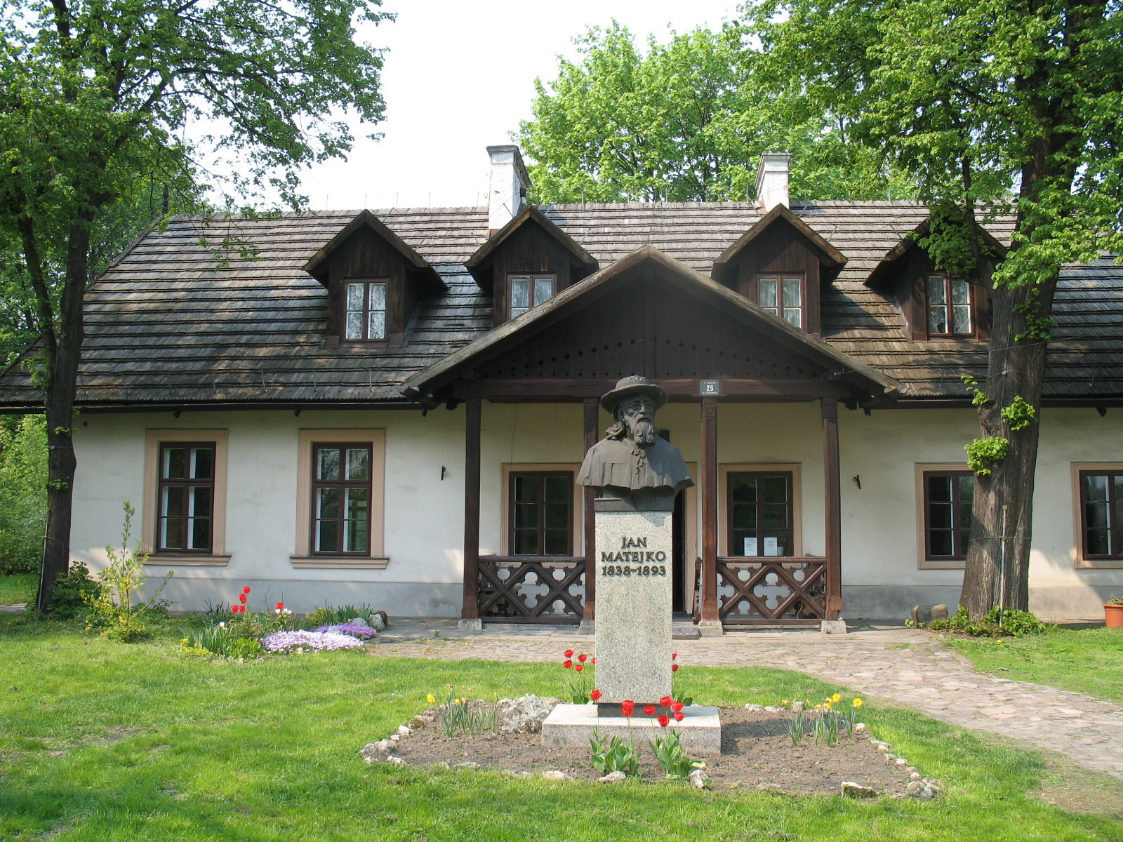 Dworek Jana Matejki w Krzesławicach, Kraków / Jan Matejko's manor house in Krzesławice, Kraków